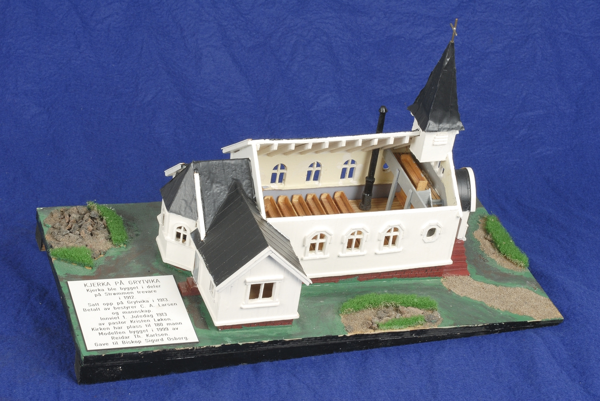 I februar 2002 fikk Hvalfangstmuseet en modell av Grytviken kirke. Originalen ble oppført i Grytviken, Syd Georgia i 1913 etter initiativ av Grytvikens bestyrer kaptein C. A. Larsen. Modellen er bygget av Reidar Th. Karlsen i 1999 og gitt i gave til biskop Sigurd Osberg